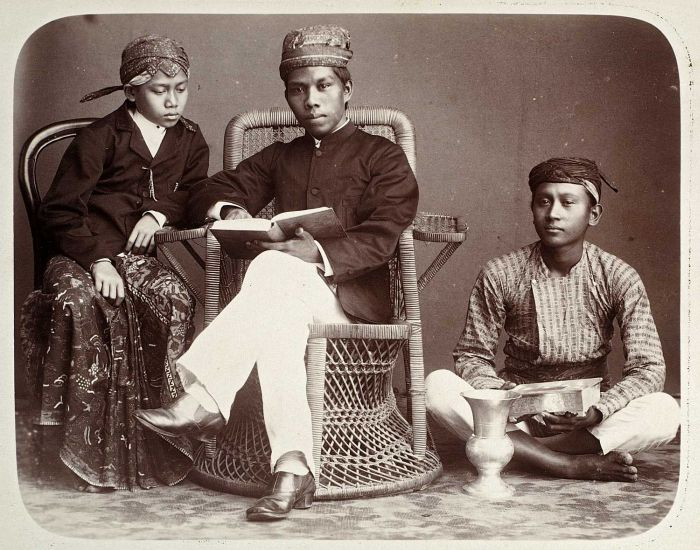 Foto. Net als voor de bekering van de bevolking geldt dat de VOC zich alleen zeer lokaal met onderwijs bezig hield, in feite alleen daar waar ook de Protestantse kerken tot ontwikkeling kwamen. Kerk en school werden als onlosmakelijk gezien en daar waar geen kerk was en wel een school nam de laatste in feite taken van de eerste op zich. Intussen bestonden er op Java duizenden mohammedaanse godsdienstscholen (pesantren), vooral in de Residentie Madioen. Tot ca. 1900 waren de pogingen van het Gouvernement om scholen met een Westerse inslag op te richten niet indrukwekkend. Eigenlijk werd dit pas in de jaren 60 van de 19e eeuw als een taak van de koloniale overheid gezien: in 1867 wordt het Departement van Onderwijs en Eredienst opgericht. (P. Boomgaard, 2001). Studioportret van een onderwijzer met zijn leerling en een bediende